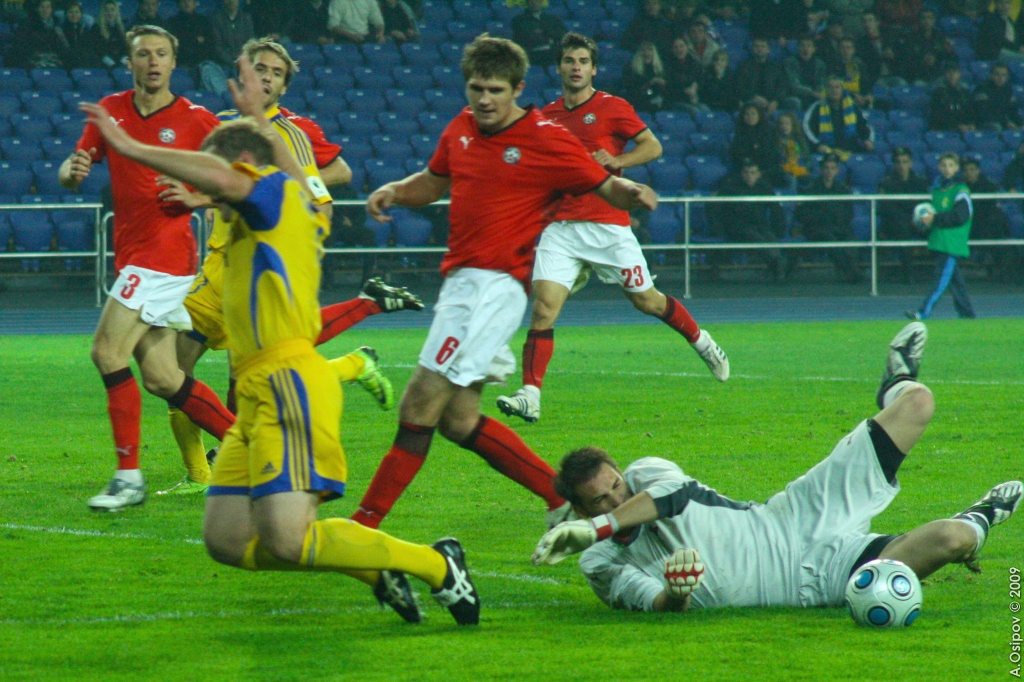 падение Валентина Слюсаря после столкновения с Хиди